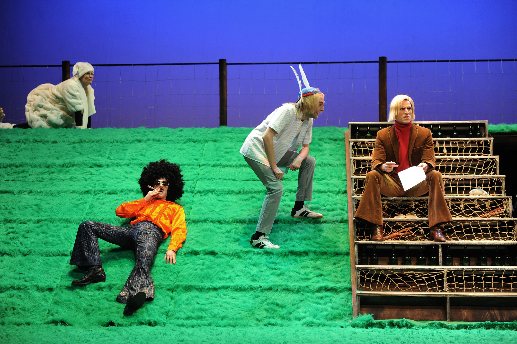 Musical "Meta, Norddeich" Landesbühne Niedersachsen Nord